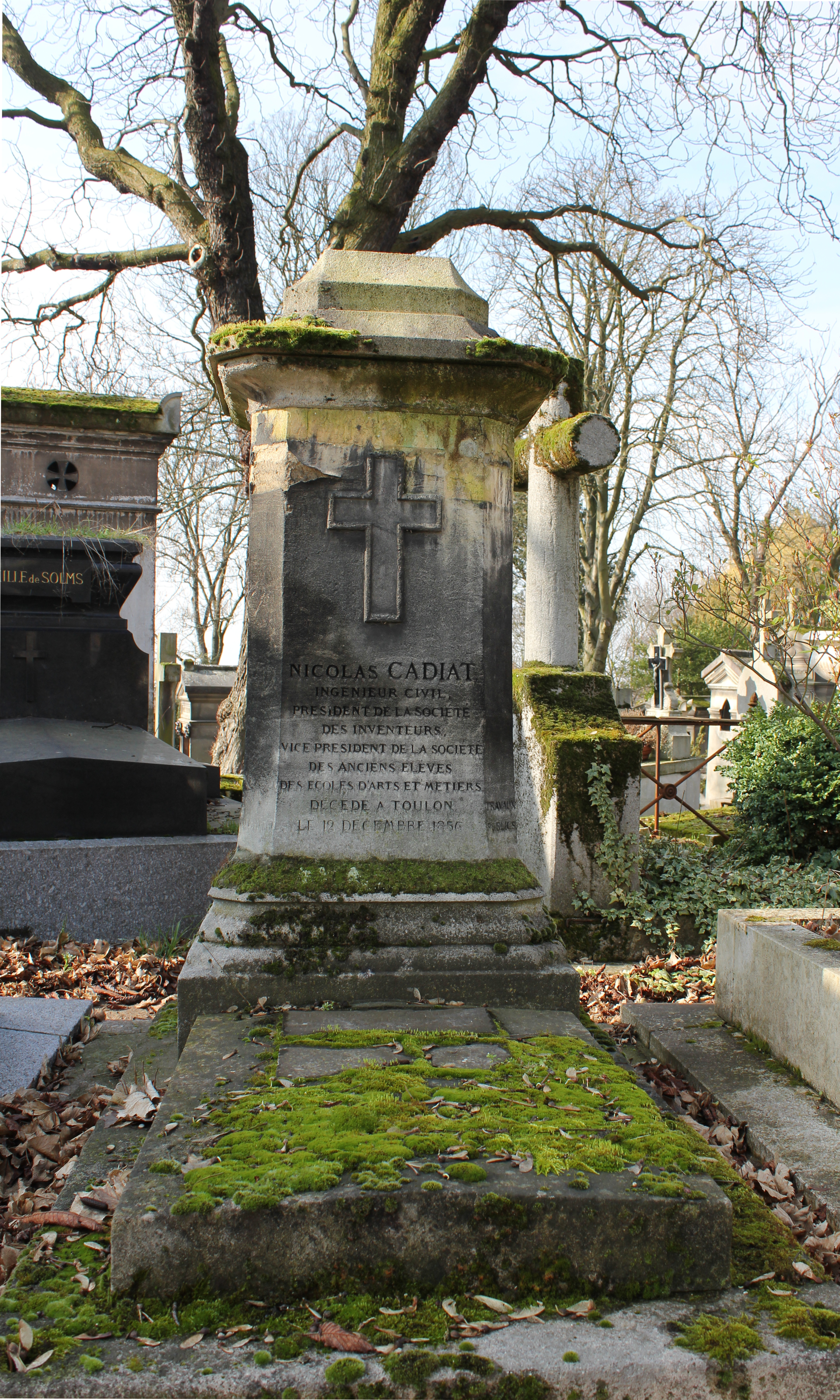 Monument qui était à l'origine orné d'un buste en bronze.